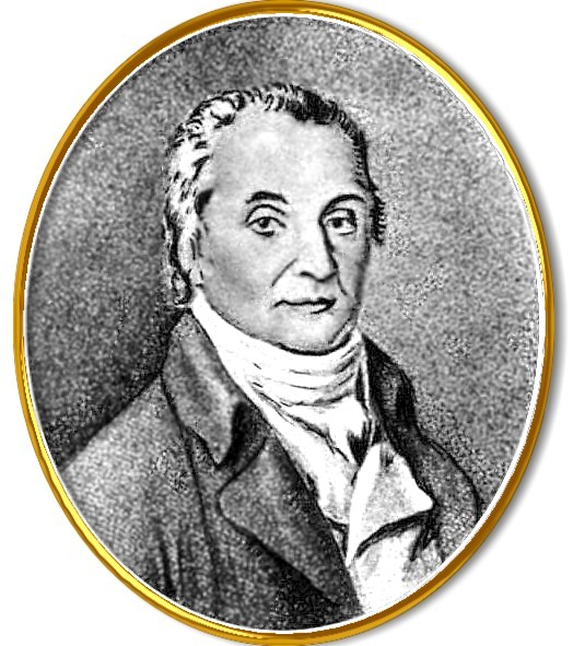 Józef Wybicki